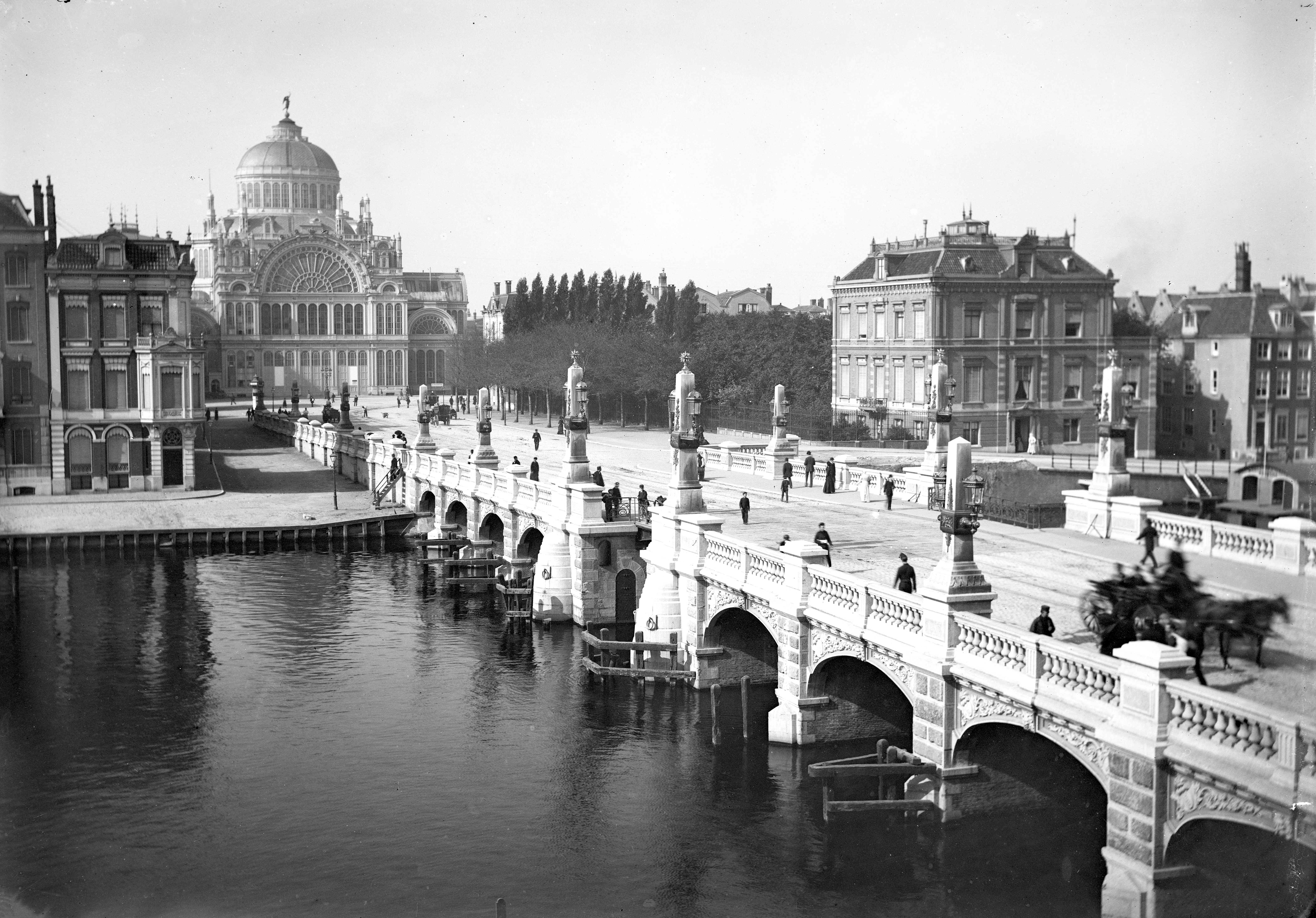 Beschrijving De Hogesluis over de Amstel gezien naar de Sarphatistraat en het Paleis voor Volksvlijt op het Frederiksplein Links Sarphatikade 1-2 (ged.). Rechts de villa Amstel 344, in 1867 gebouwd voor A.W. van Eeghen naar een ontwerp van architect G.B. Salm, de ingang van de Maarten Jansz. Kosterstraat en Amstel 342. Documenttype foto Vervaardiger Gebroeders Douwes (uitgever) Collectie Collectie Kunsthandel Gebr. Douwes: glasnegatieven Datering 1883 t/m 1889 Geografische naam Frederiksplein Sarphatikade Amstel Gebouw Paleis voor Volksvlijt Inventarissen Afbeeldingsbestand B00000031316 Generated with Dememorixer